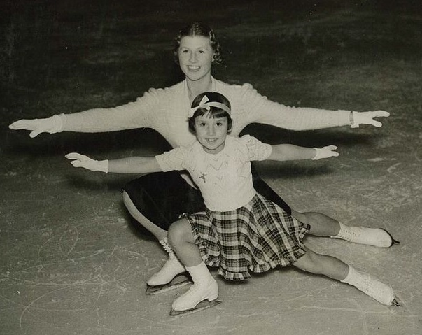 Cecilia Colledge und Eva Pawlik beim Training in Wien (1937)